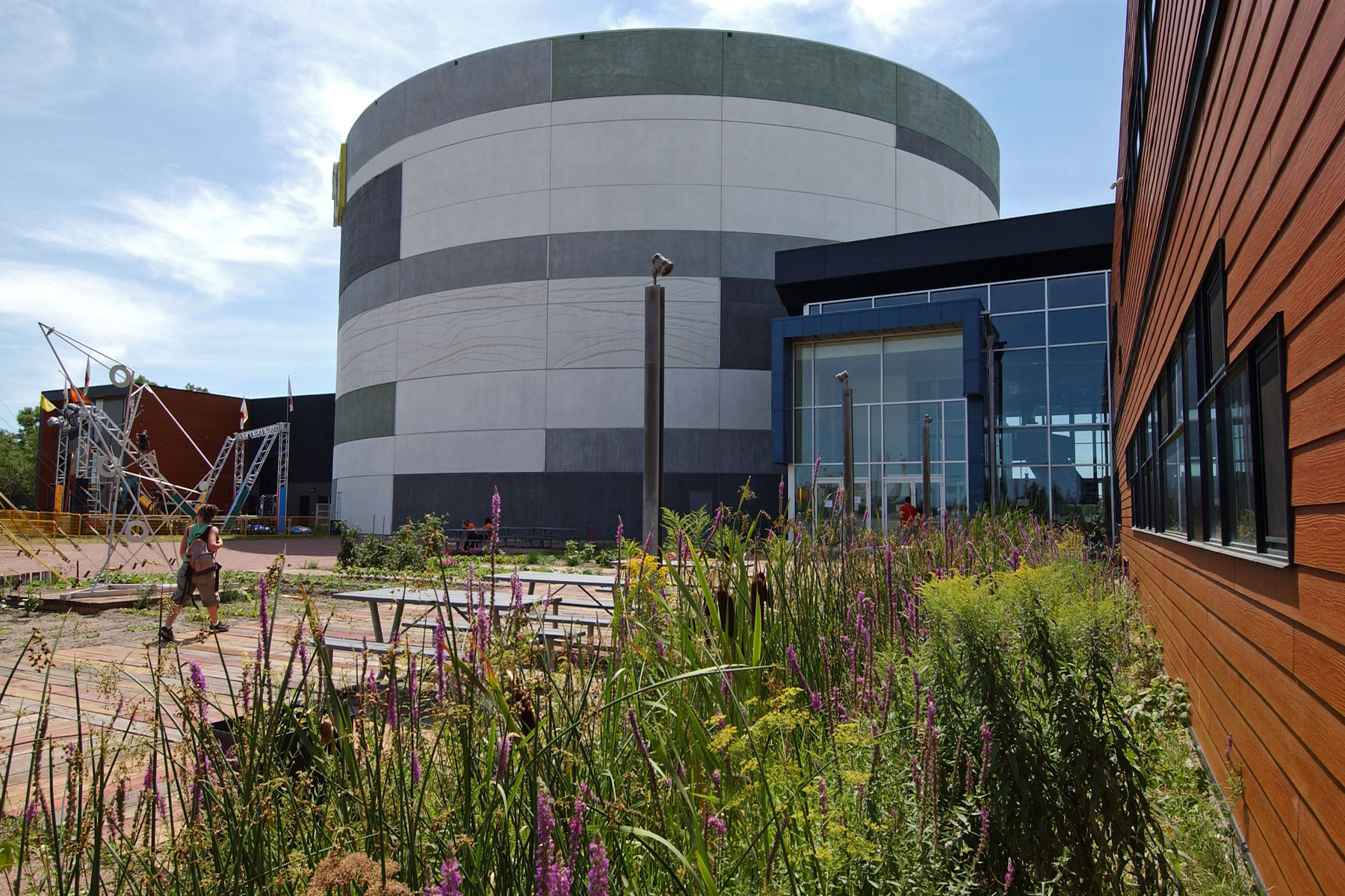 La TOHU